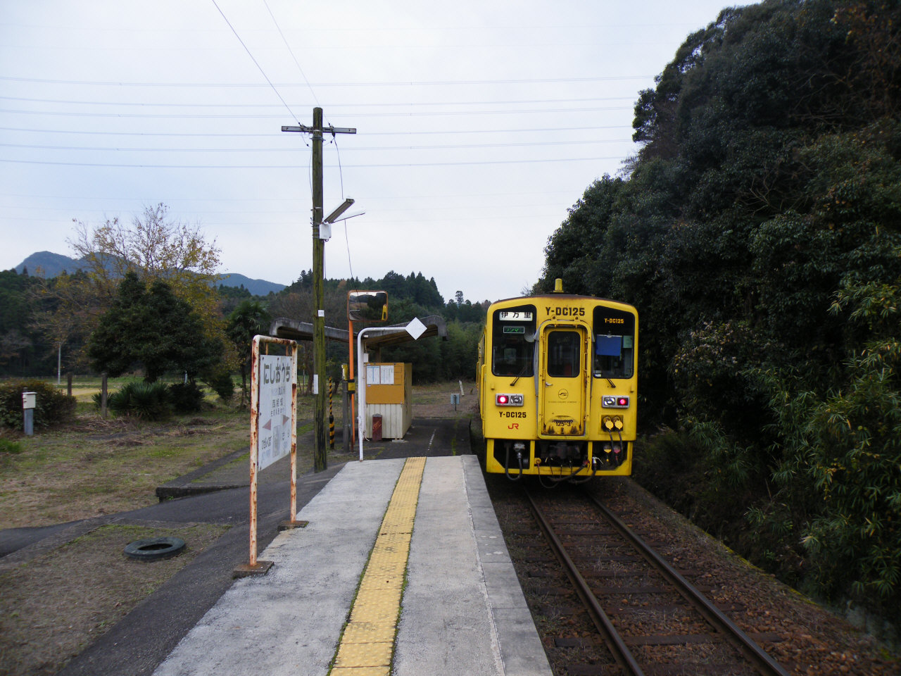 JR九州筑肥線西相知駅